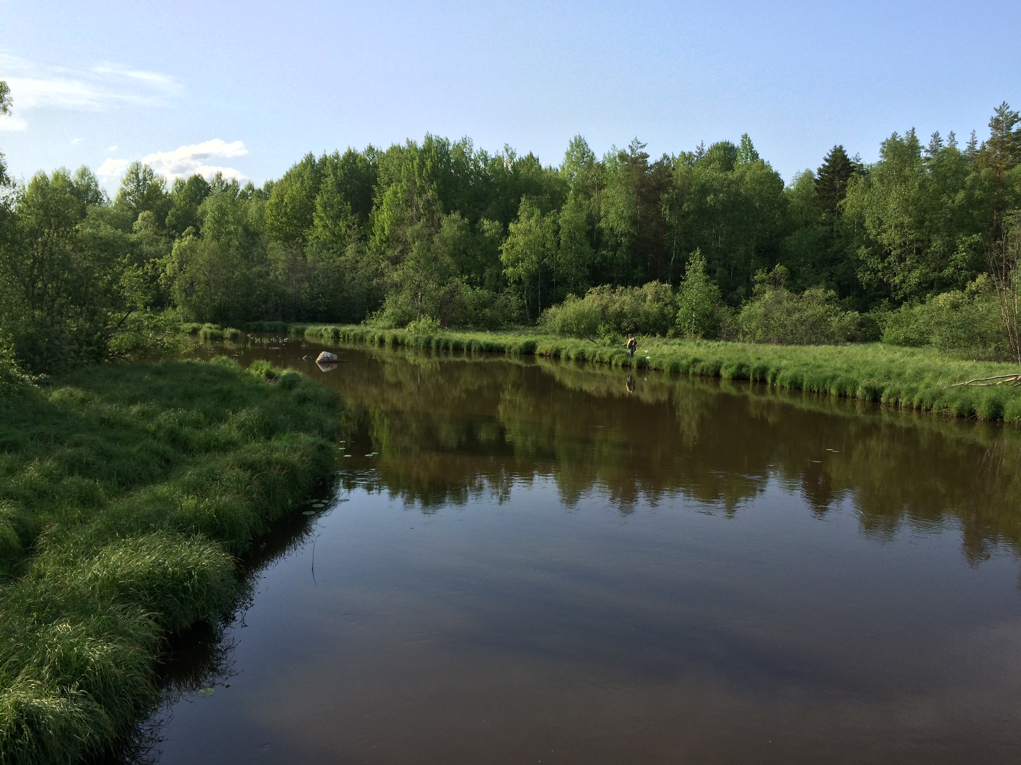 Миккильская